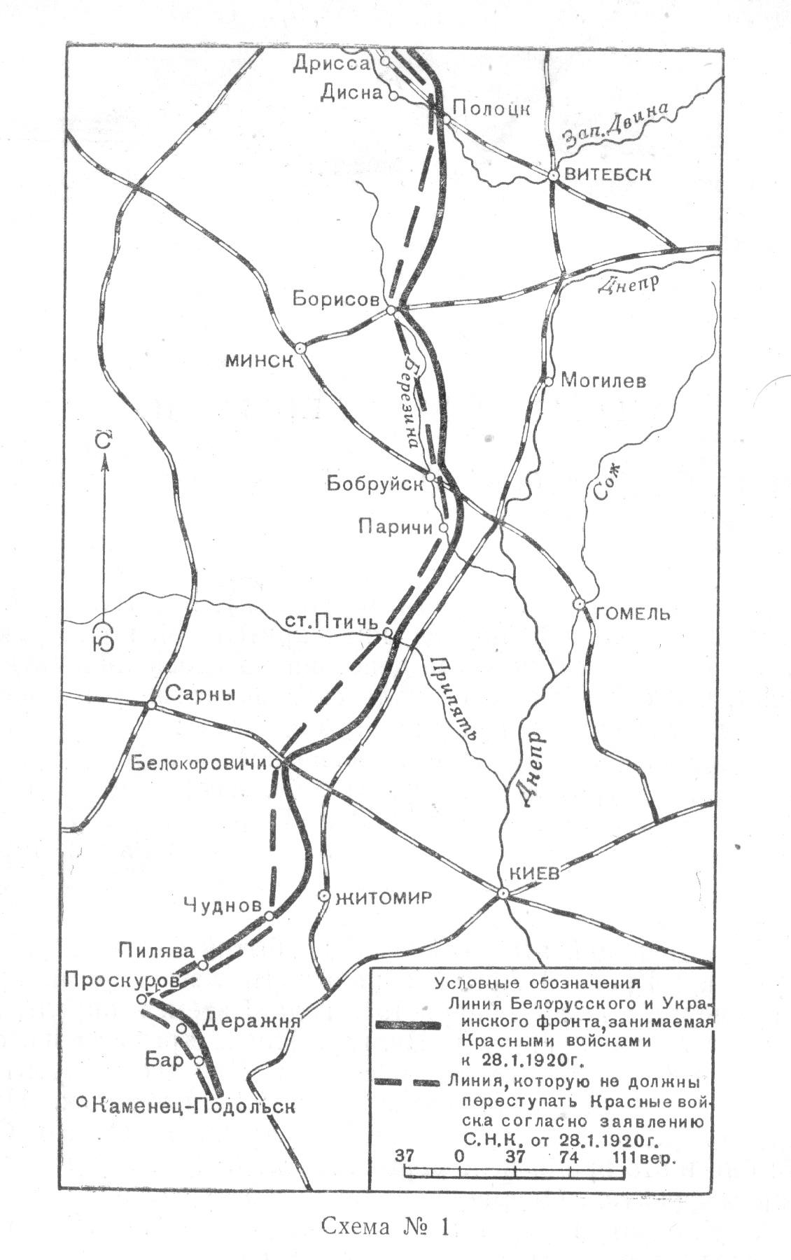 Схема 1. Линия Польско-Советского фронта к 28.1.1920. Polish-Soviet front 28.1.1920.